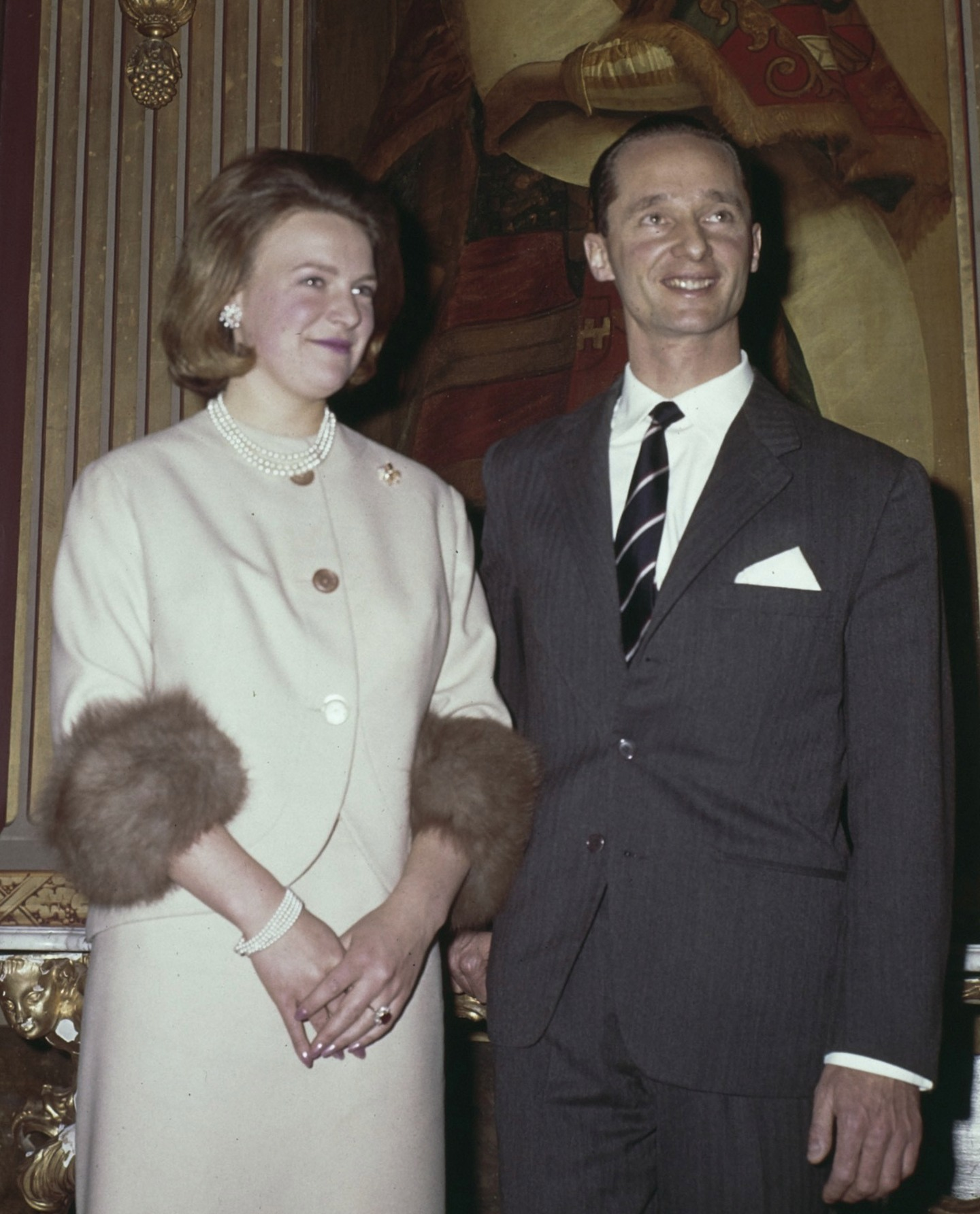 prinses Irene en haar verloofde Carel Hugo